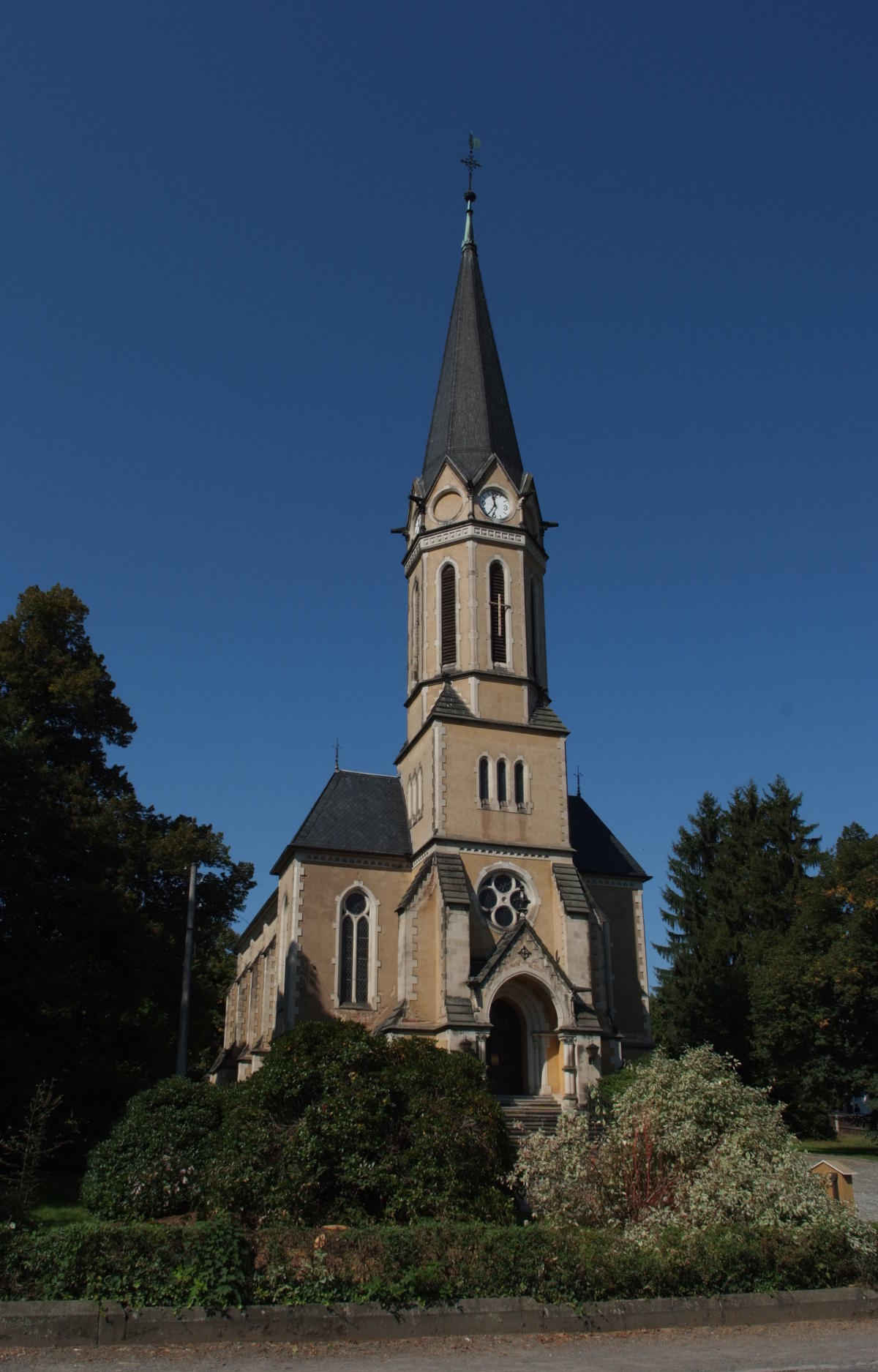 Evangelische Kirche in Erdmannsdorf